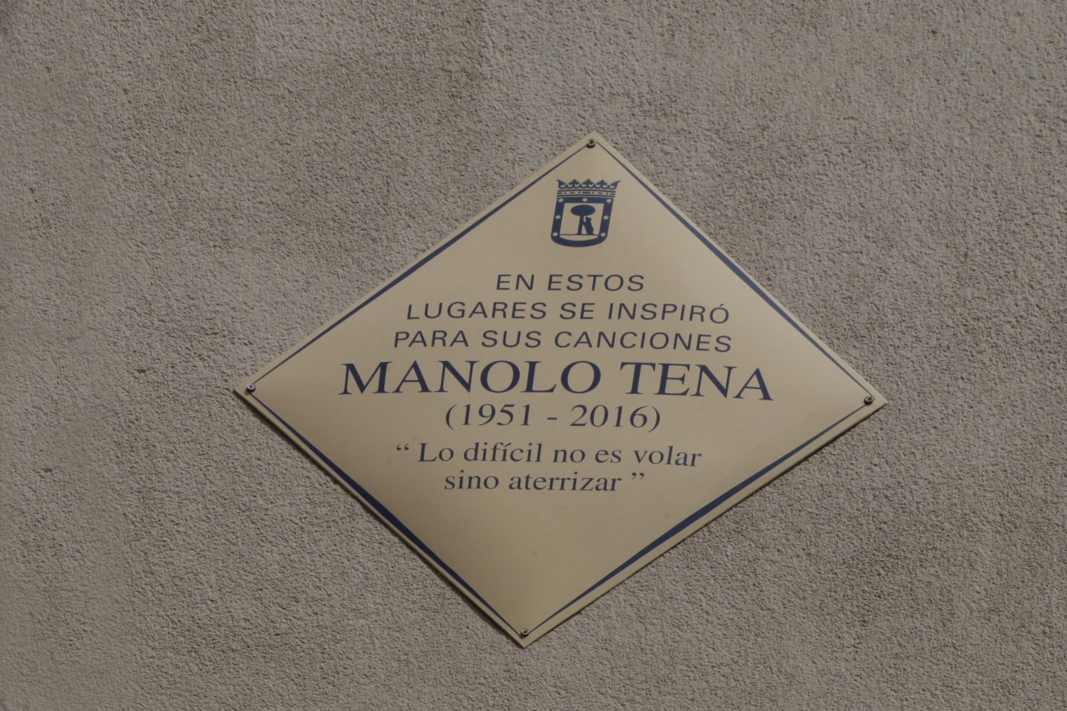 ‘En estos lugares se inspiró para inscribir sus canciones Manolo Tena (1951-2016’. Así reza la placa del Plan Memoria de Madrid que el Ayuntamiento ha instalado en la calle Argumosa, junto a la plaza de Lavapiés en recuerdo del cantante y compositor referente del rock madrileño. Asimismo recoge una conocida frase de Tena: “Lo difícil no es volar, sino aterrizar”, por expreso deseo de su familia.